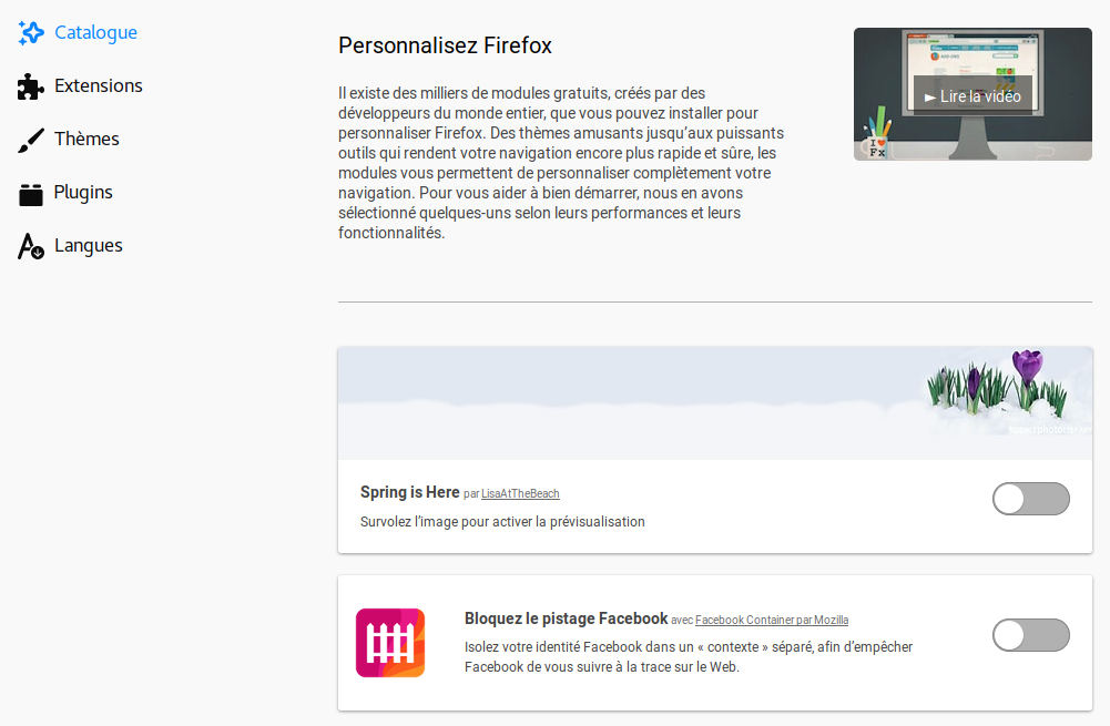 Catalogue des extensions proposées par le navigateur Mozilla Firefox version 59.0.2 sur Ubuntu 18.04 (en français de France).